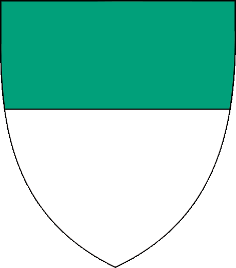 Blasón de la Casa Abatte